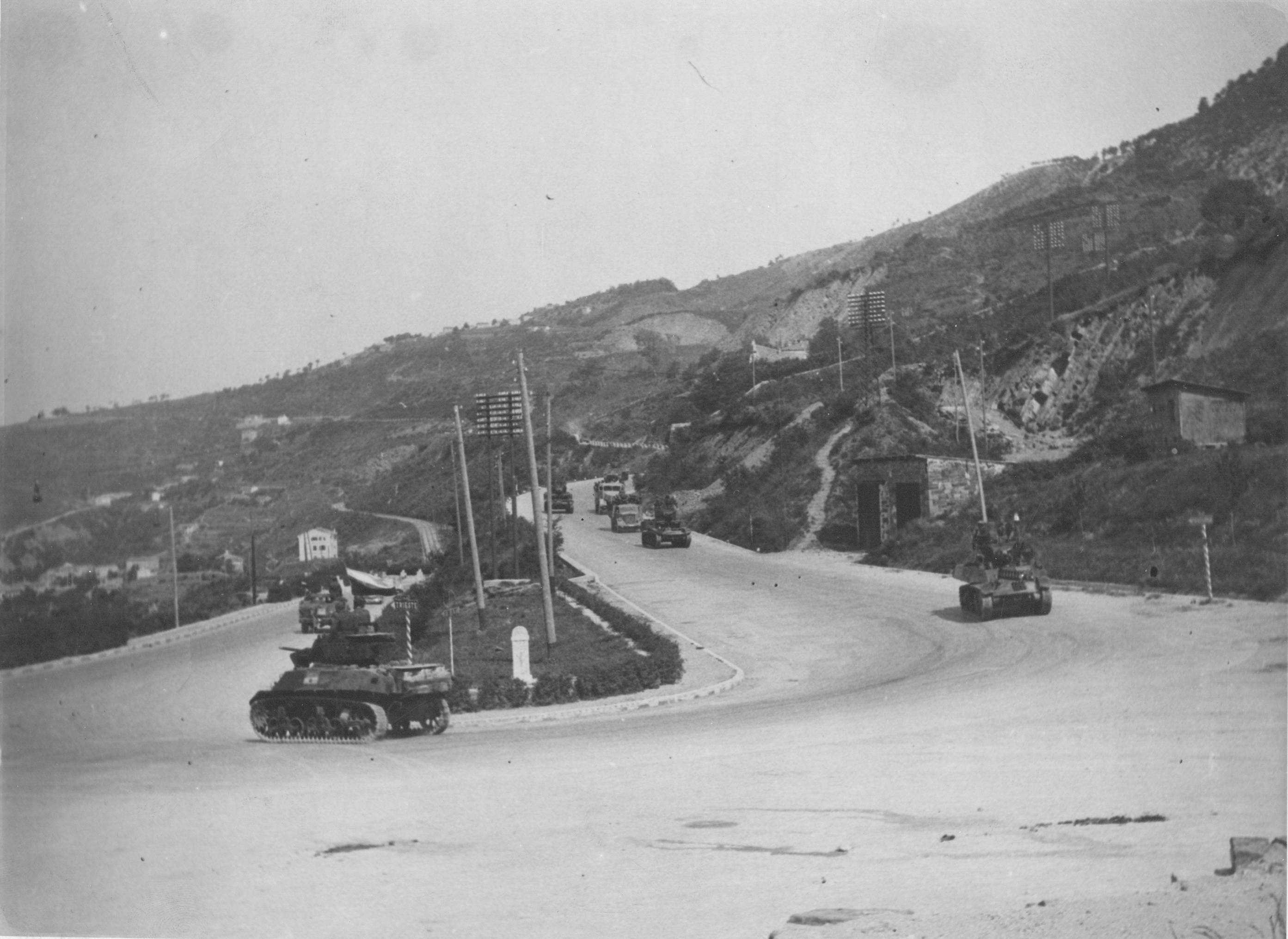 Partizanski tanki na poti v Trst.